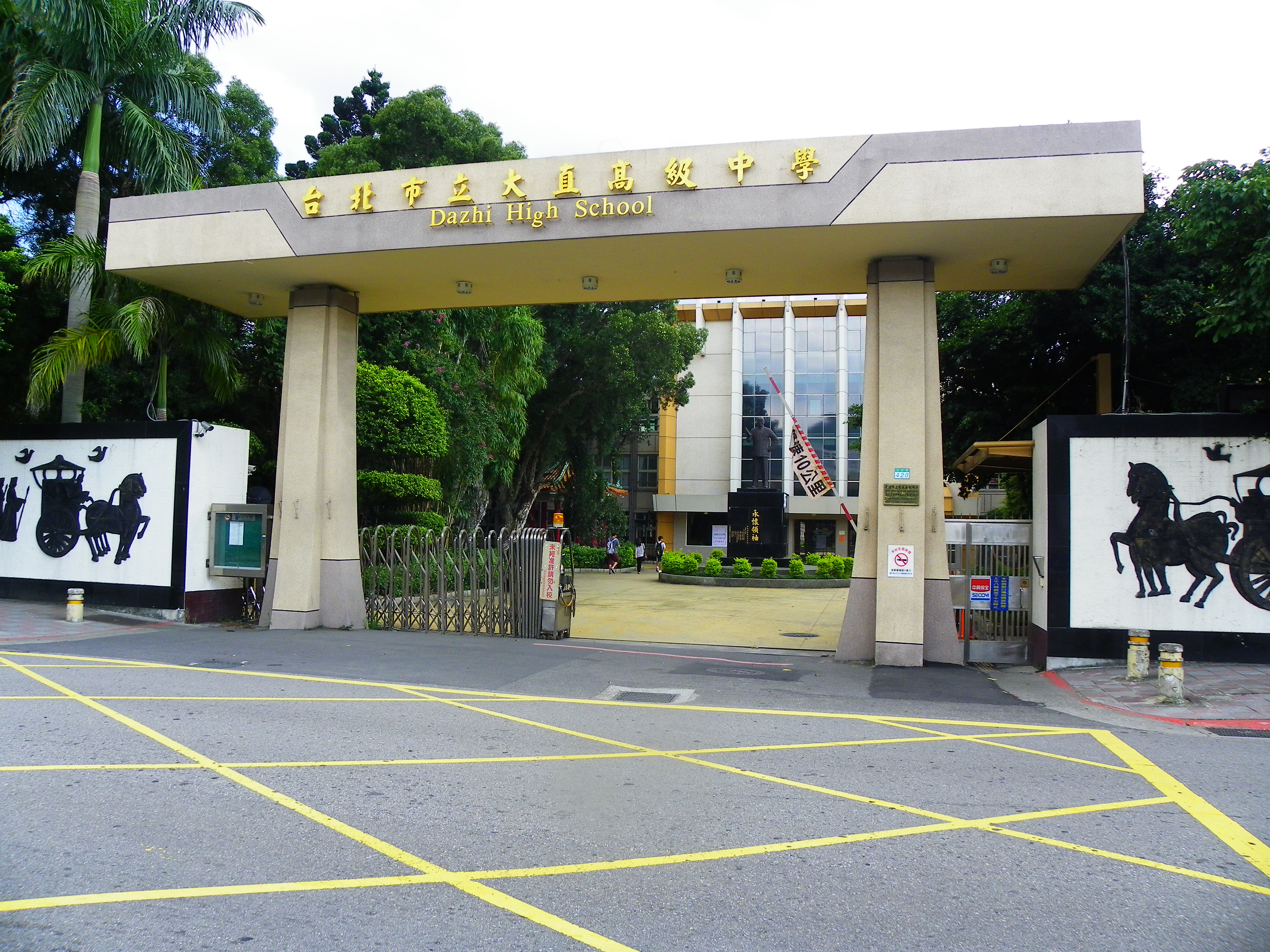 臺北市立大直高級中學，地址：臺北市中山區北安路420號。